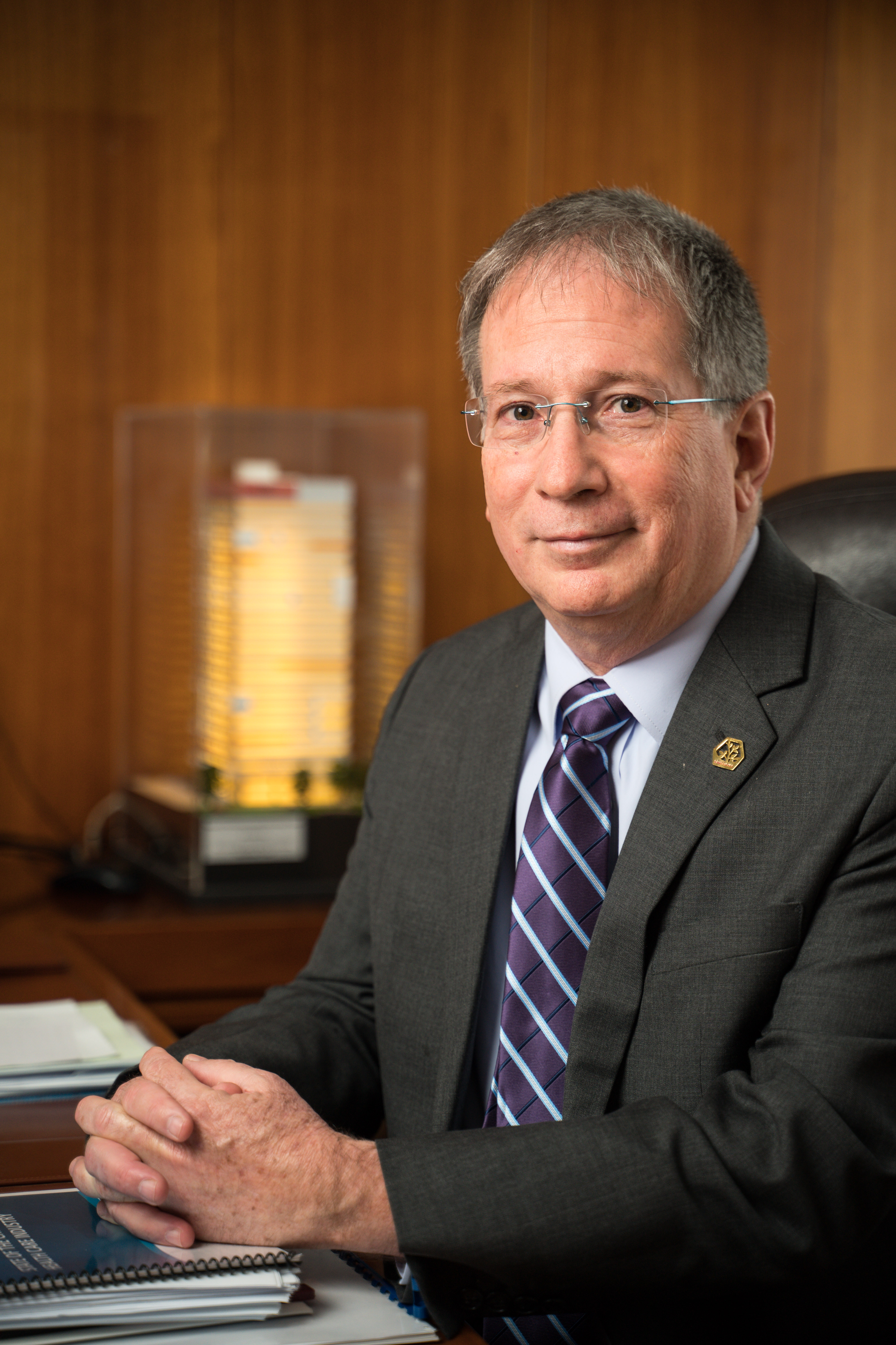 מנהל הית החולים החלך ממרץ 2019